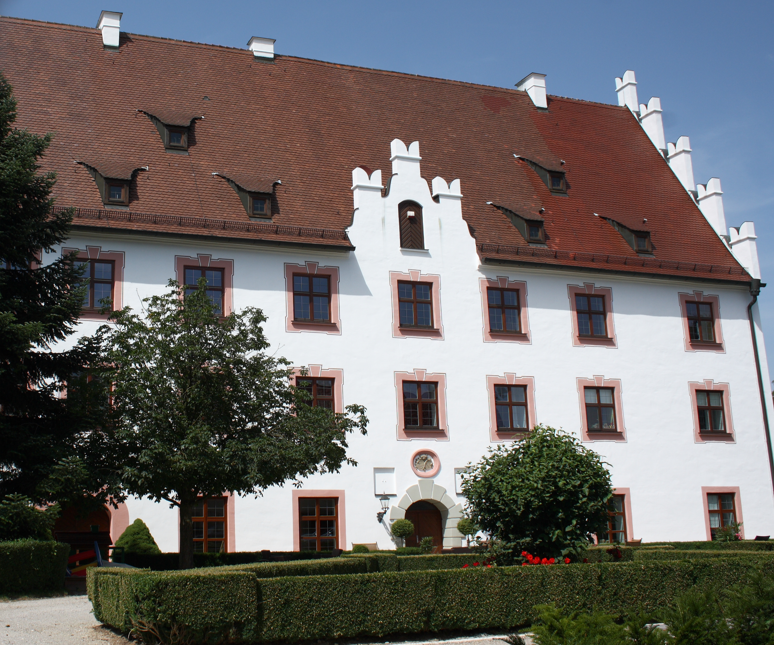 Schloss der Freiherren von Stain in Eberstall, einem Ortsteil von Jettingen-Scheppach im Landkreis Günzburg (Bayern), erbaut um 1602